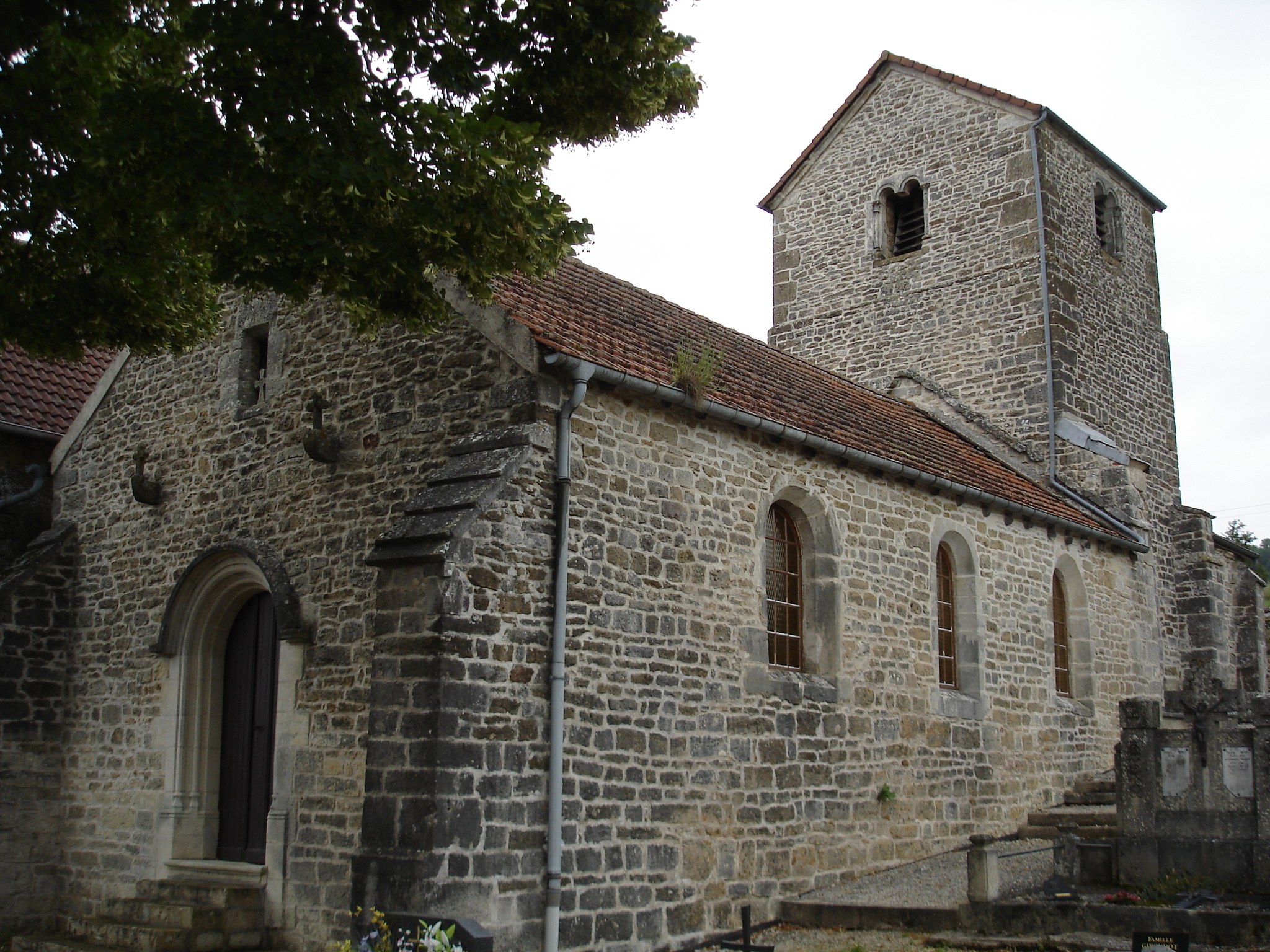 L'église Saint-Martin de Hâcourt (Haute-Marne)